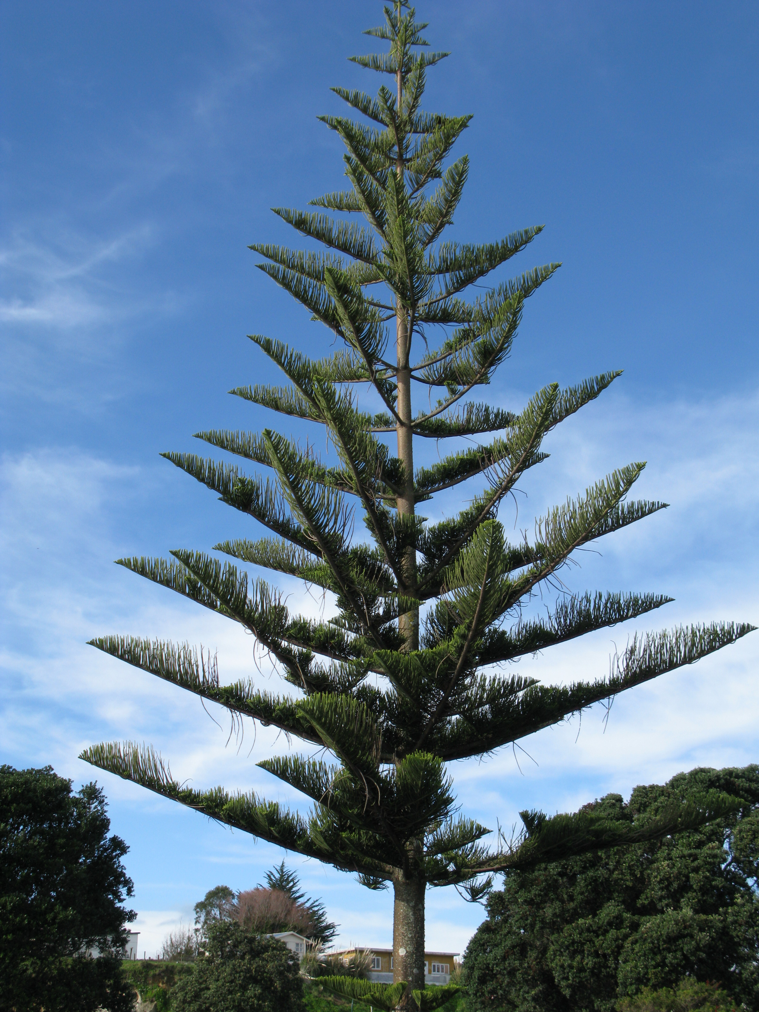 Araucaria heterophylla en nouvelle Zélande